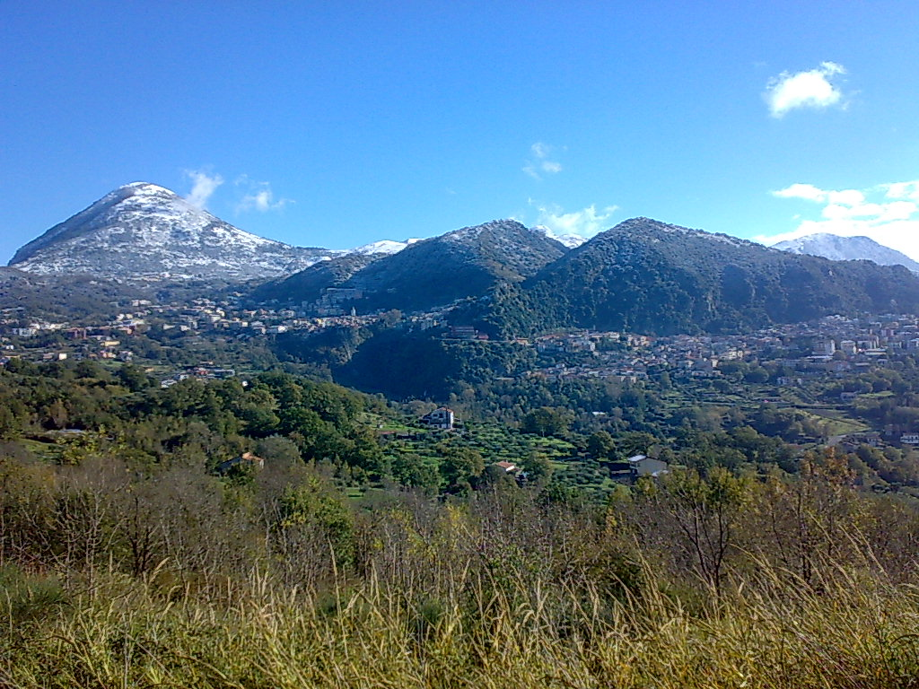 Panorama Lauria